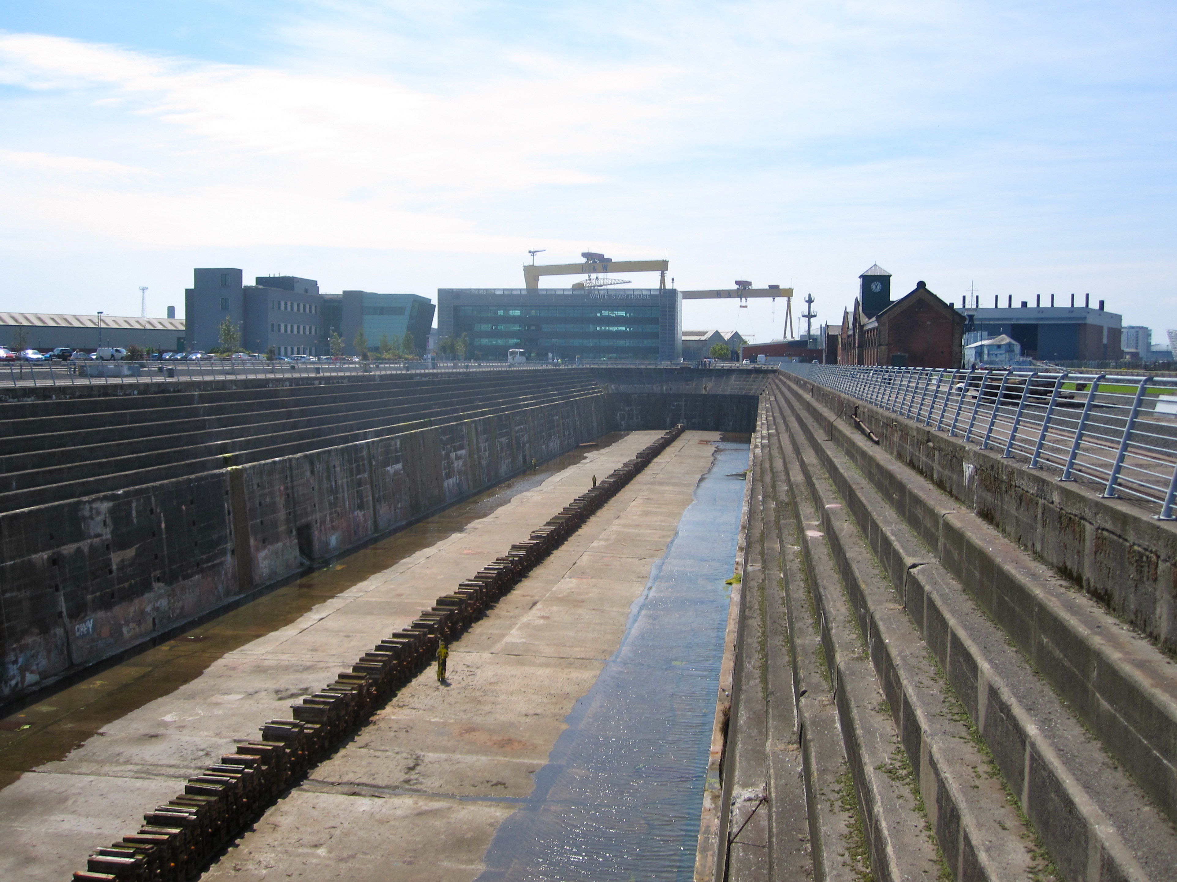 Das Trockendock in Belfast, in dem die Titanic gebaut wurde. Im Hintergrund sind die Kräne David und Goliath von Harland & Wolff zu sehen.